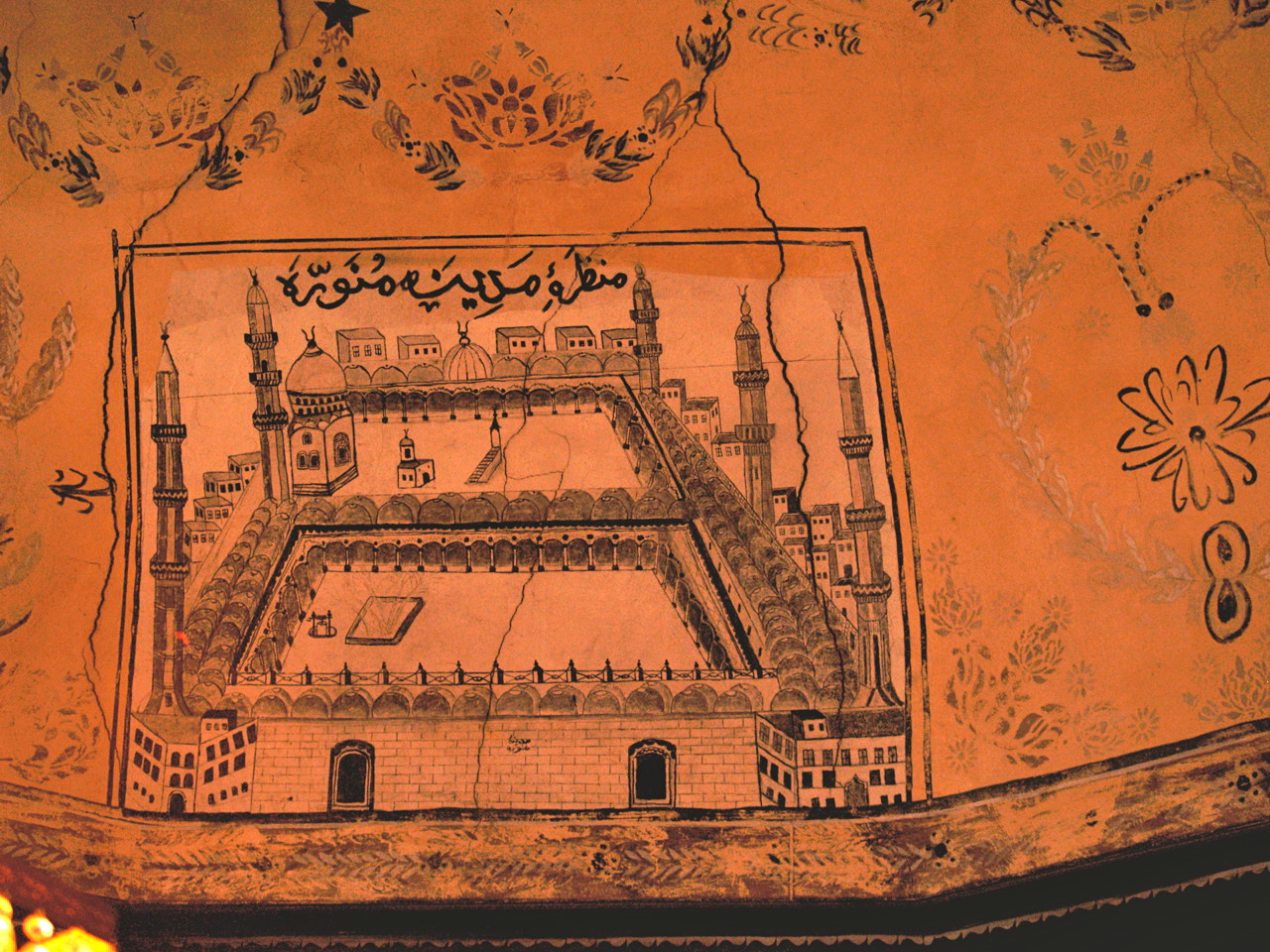 Gjakove Kosova